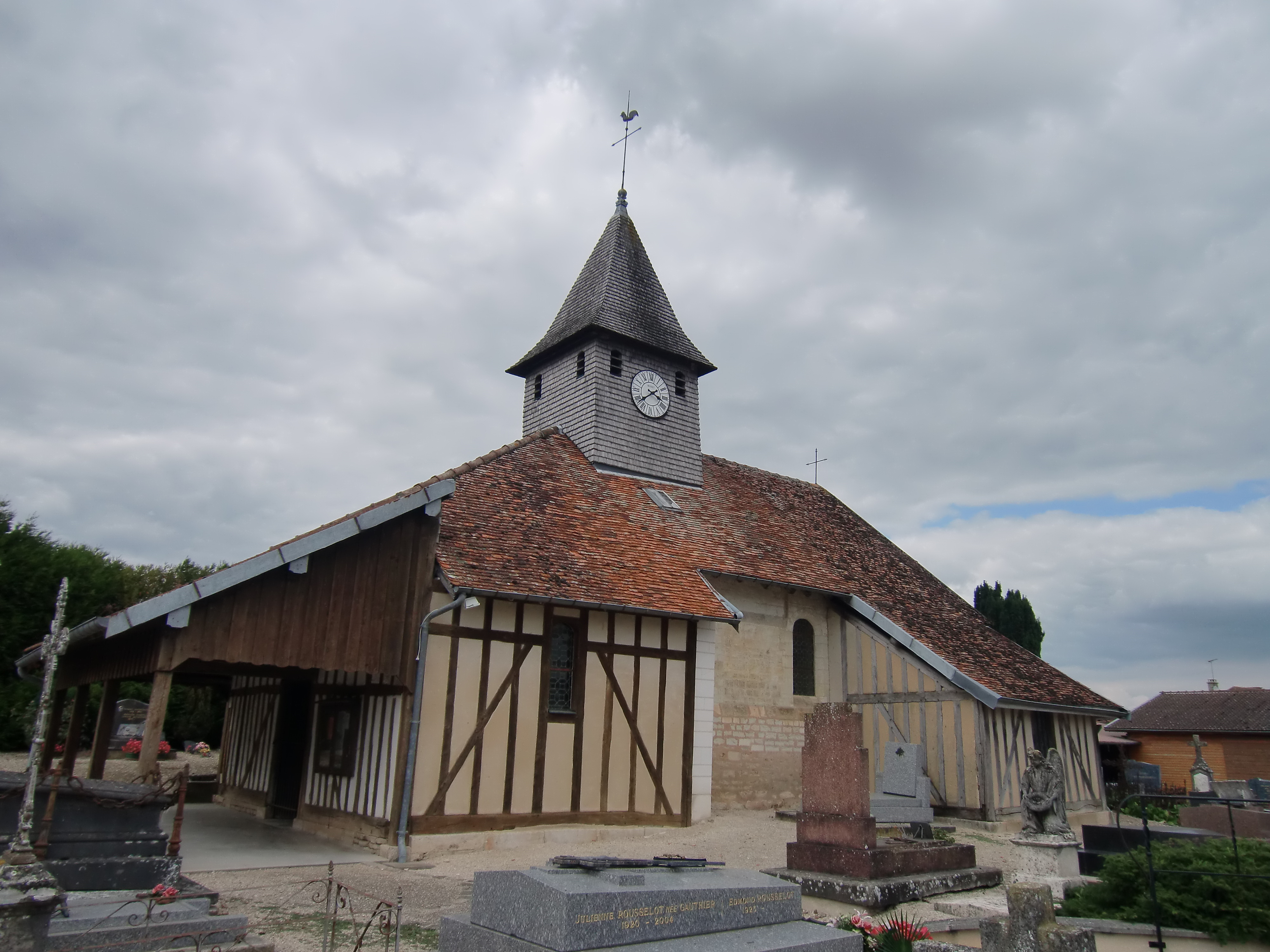 Eglise de Pars-lès-Chavanges (Aube - Champagne - France) édifice à pans de bois de la région du Der